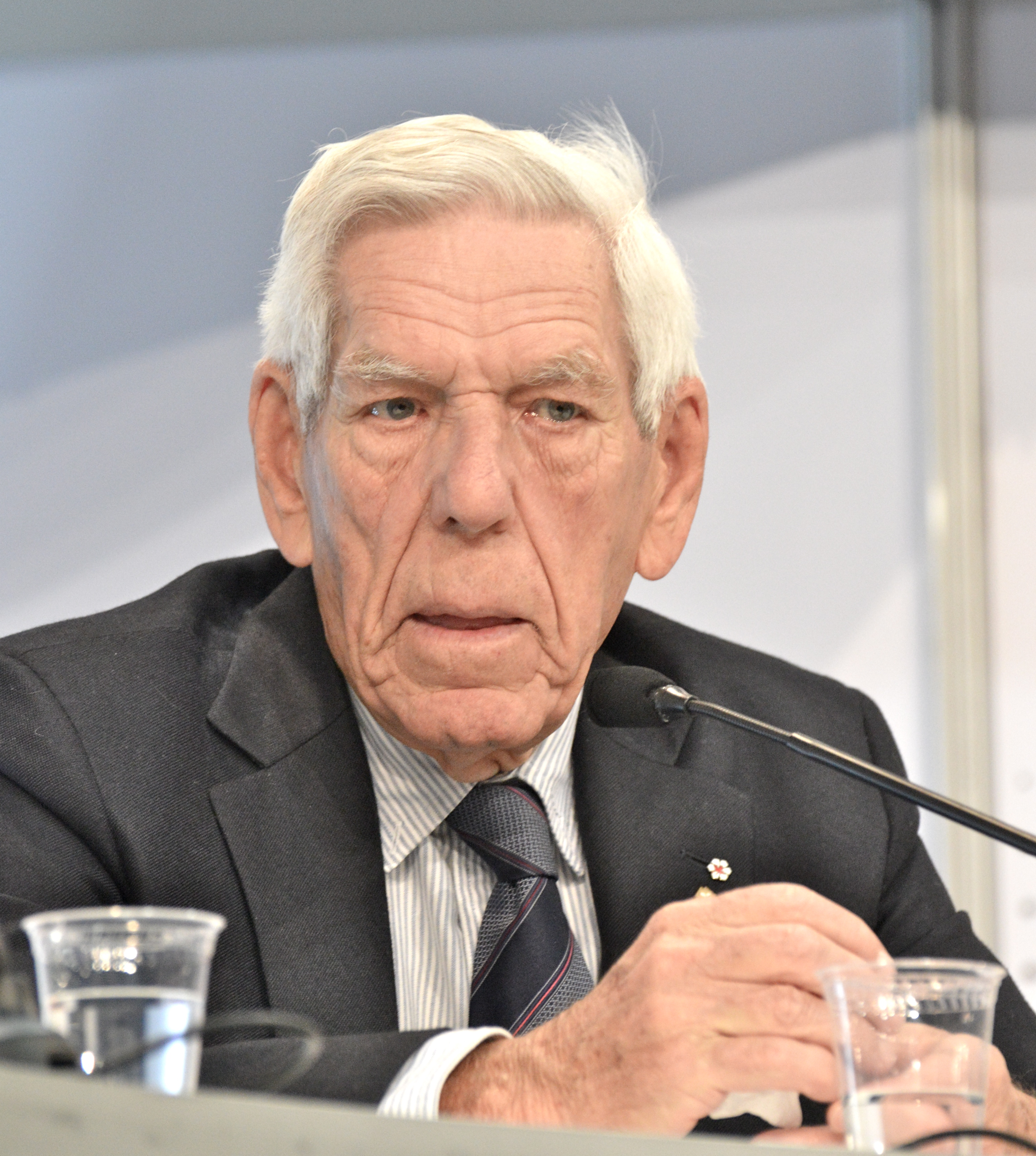 Claude Castonguay au Salon international du livre de Québec 2015